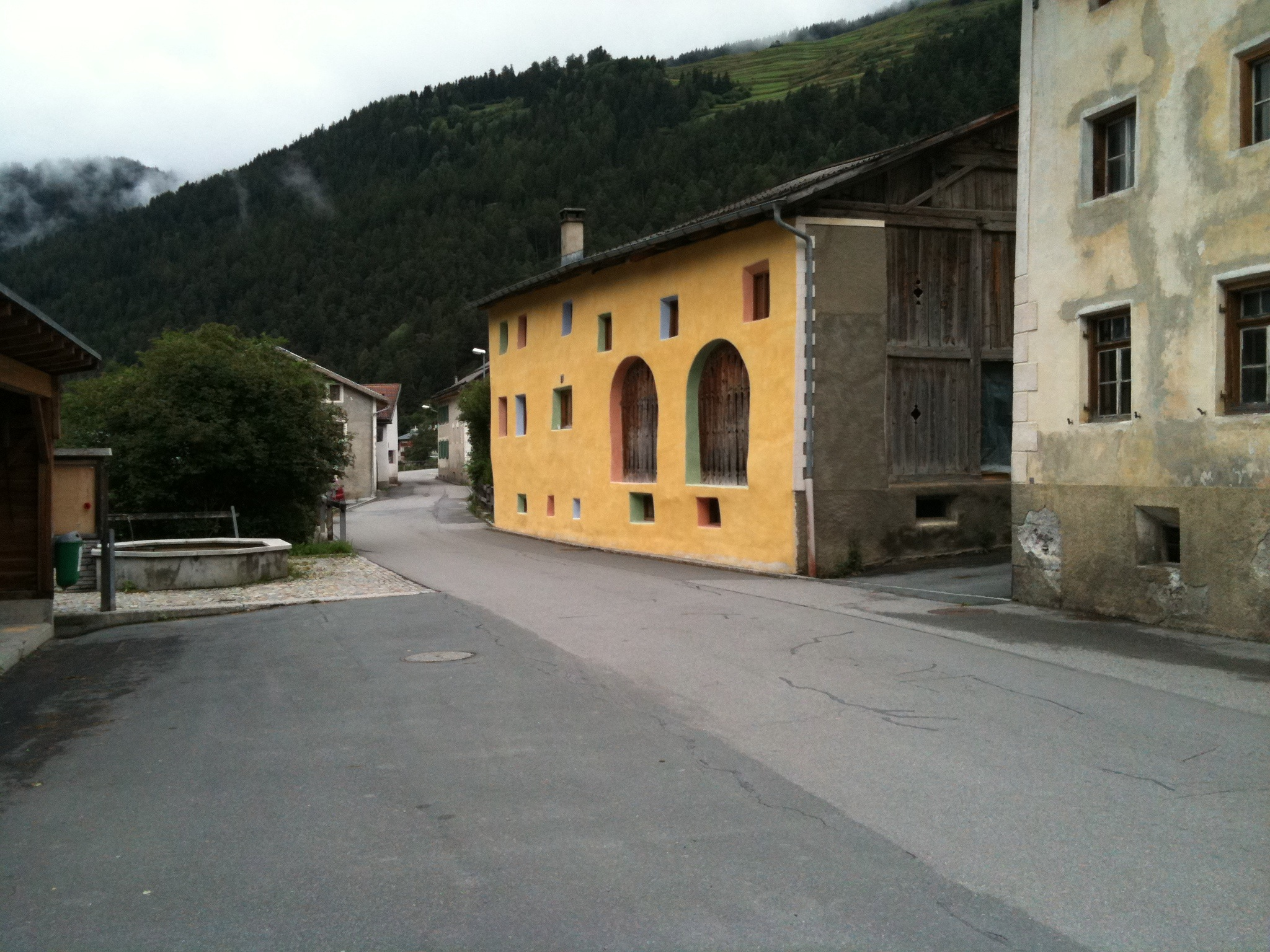 Strassenbild in Strada im Engadin (Gemeinde Tschlin)